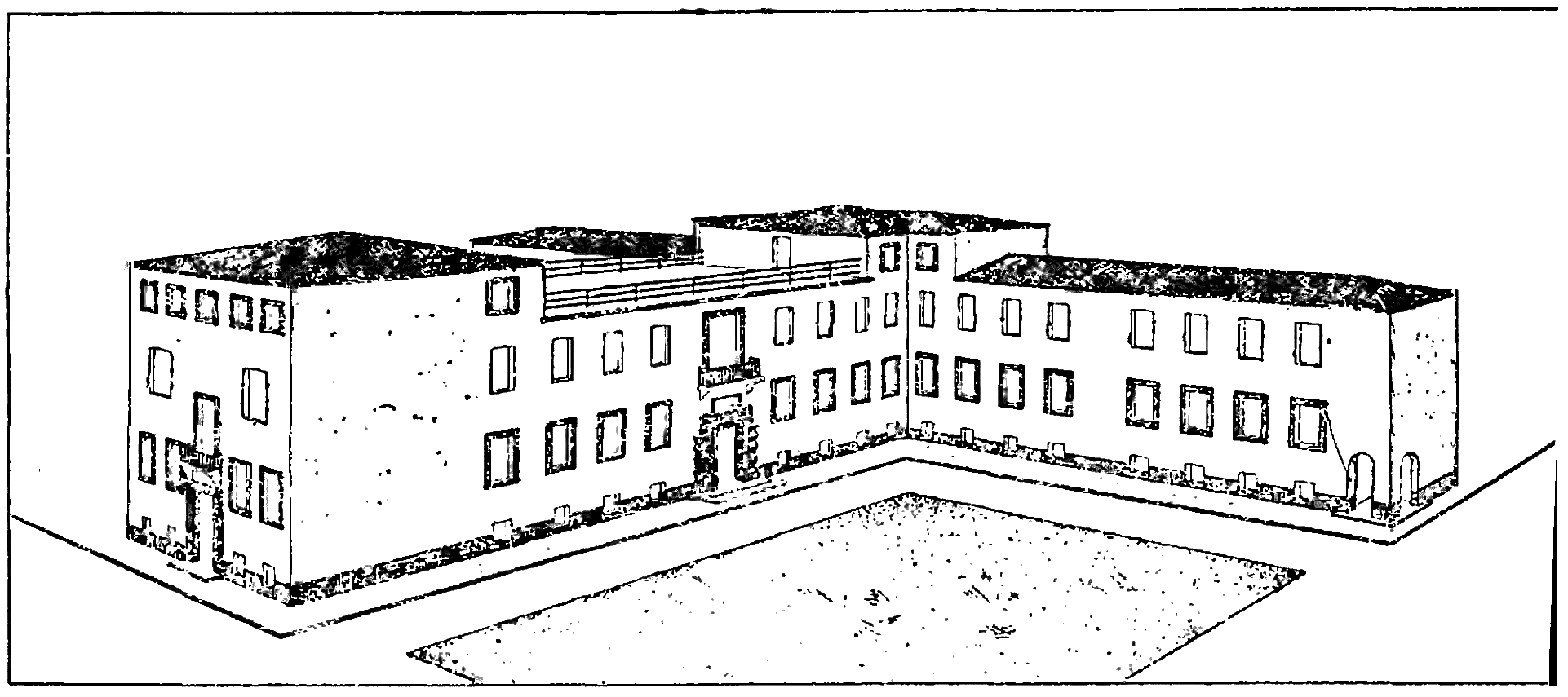 grafika z książki PL